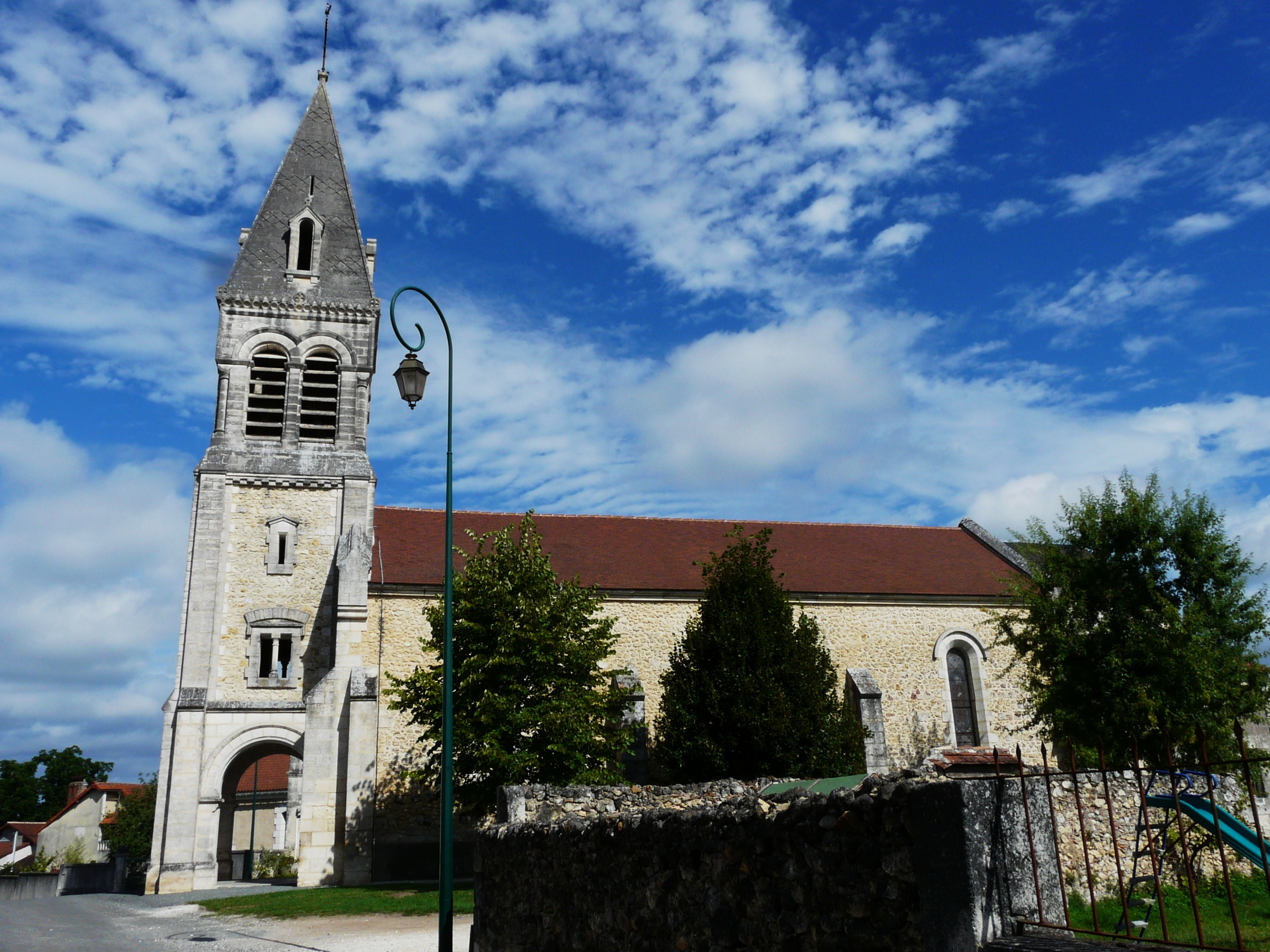 L'église Saint-Michel à Saint-Michel-de-Double